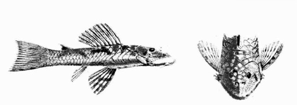 Chaetostoma guairense Steindachner 1882 Steindachner, Franz. 1882: Belträge zur kenntniss der Flussfische Sudamerikas II, III. Denkschr. Akad. Wiss. Wien. 43:103-146.